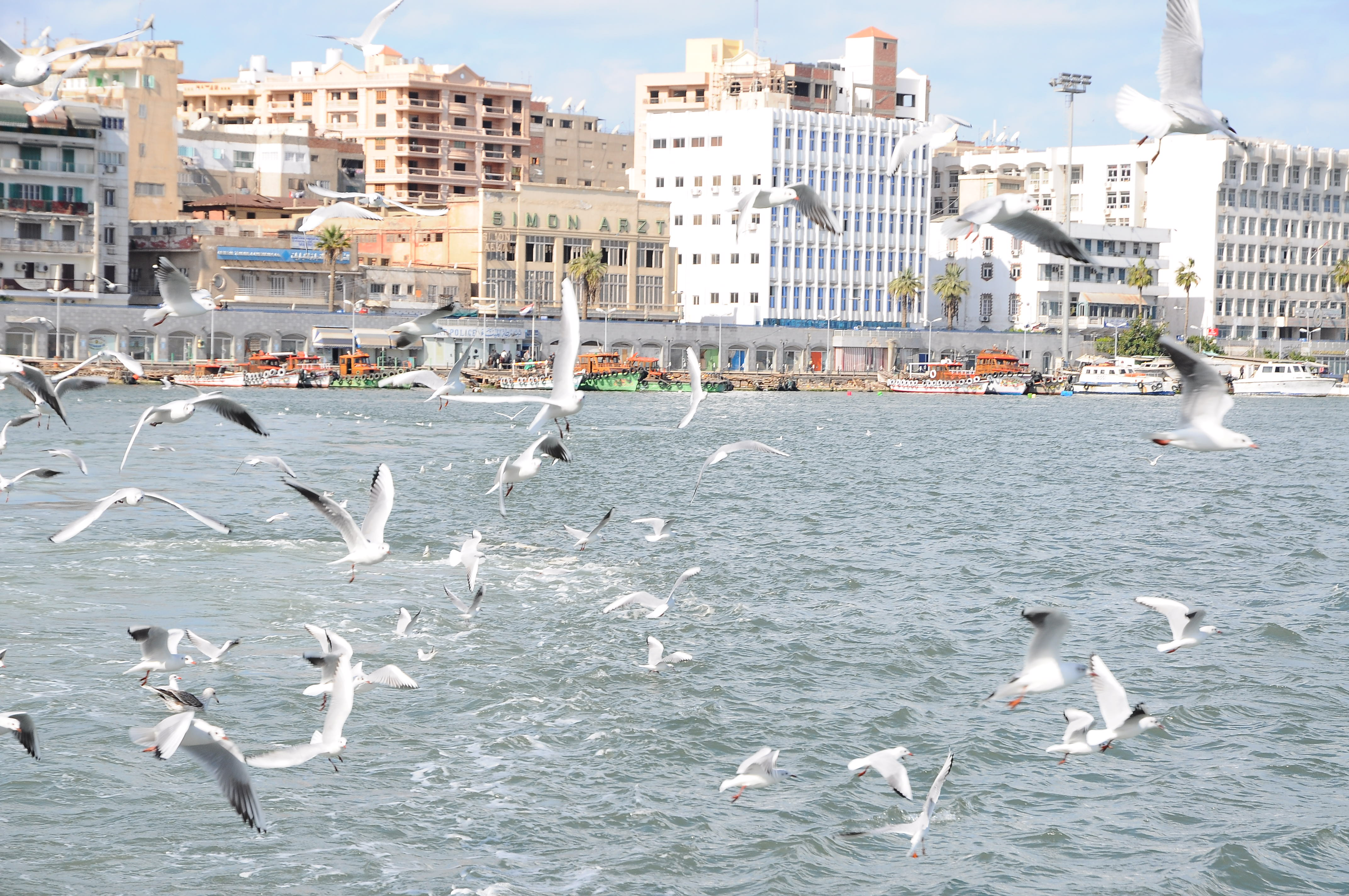 ميناء بورسعيد